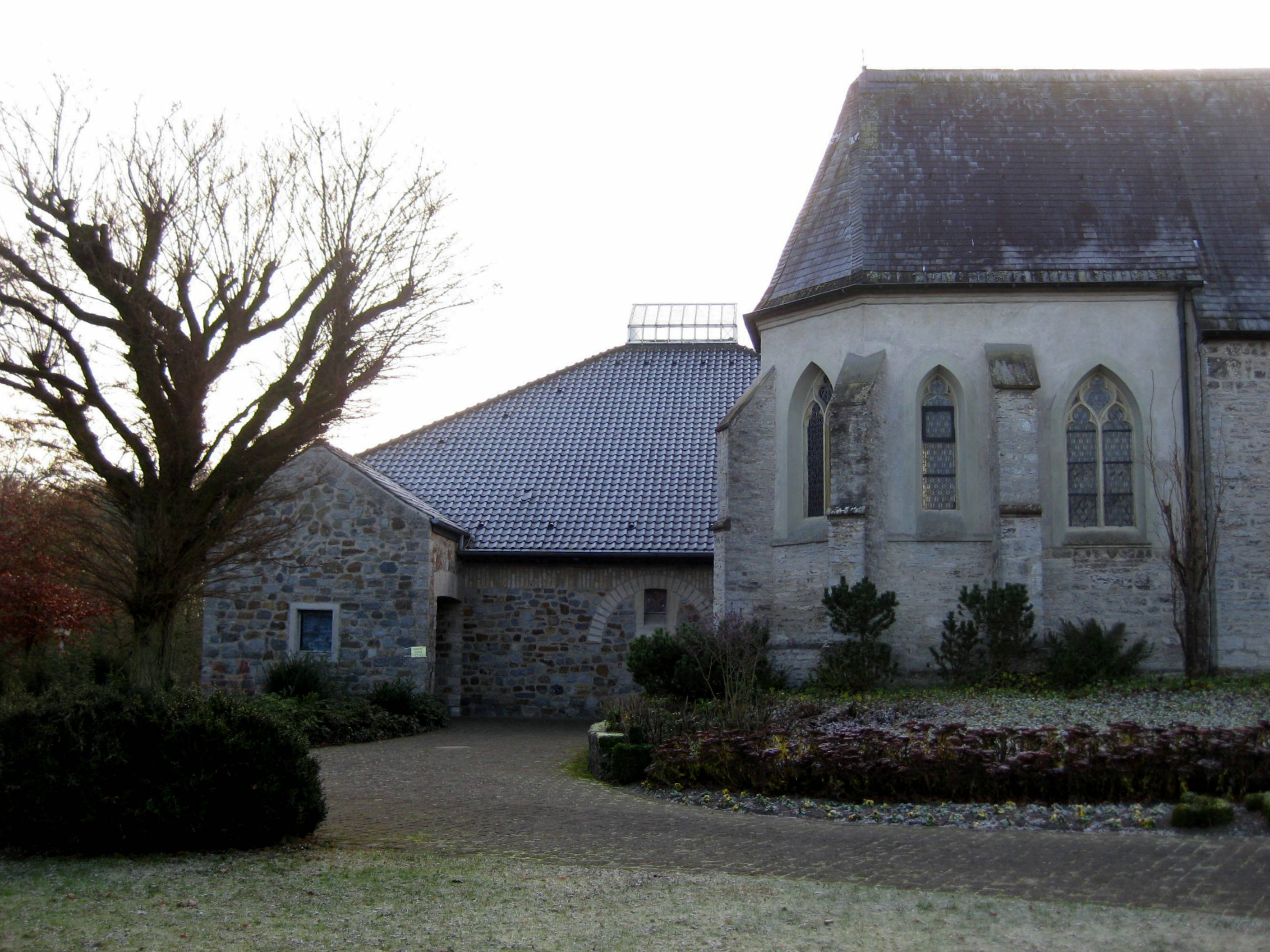 Der Neubau liegt im Osten hinter der alten Kirche in der Dorfmitte von Einen (Warendorf).